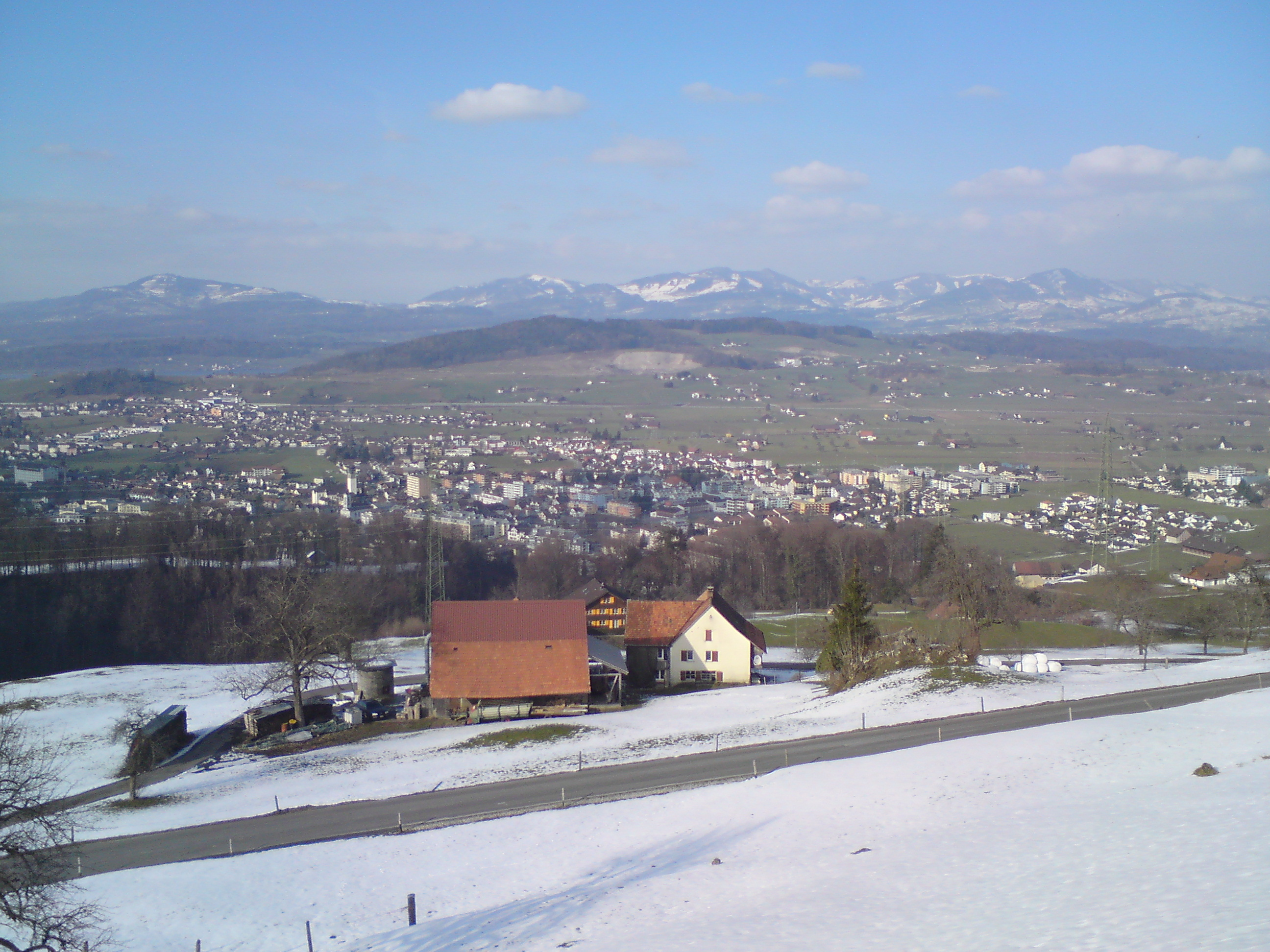 Siebnen von der Schwendelen her gesehen